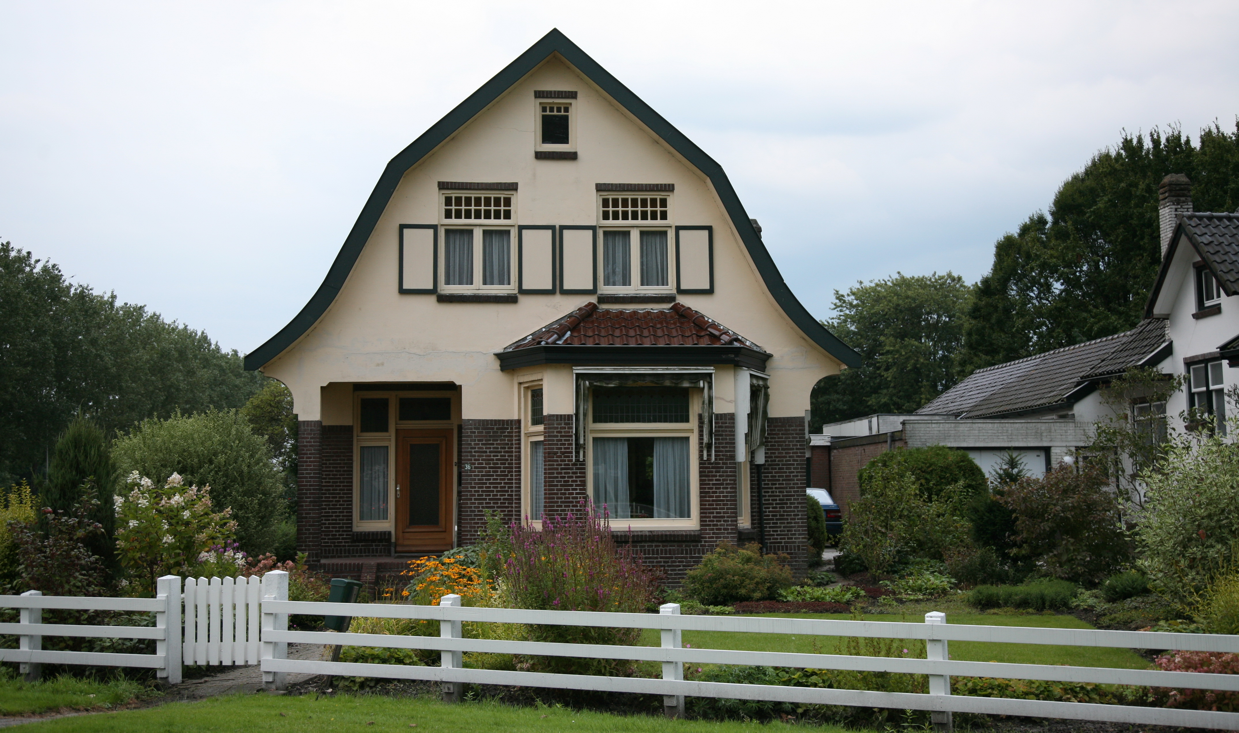 lemmer (1)